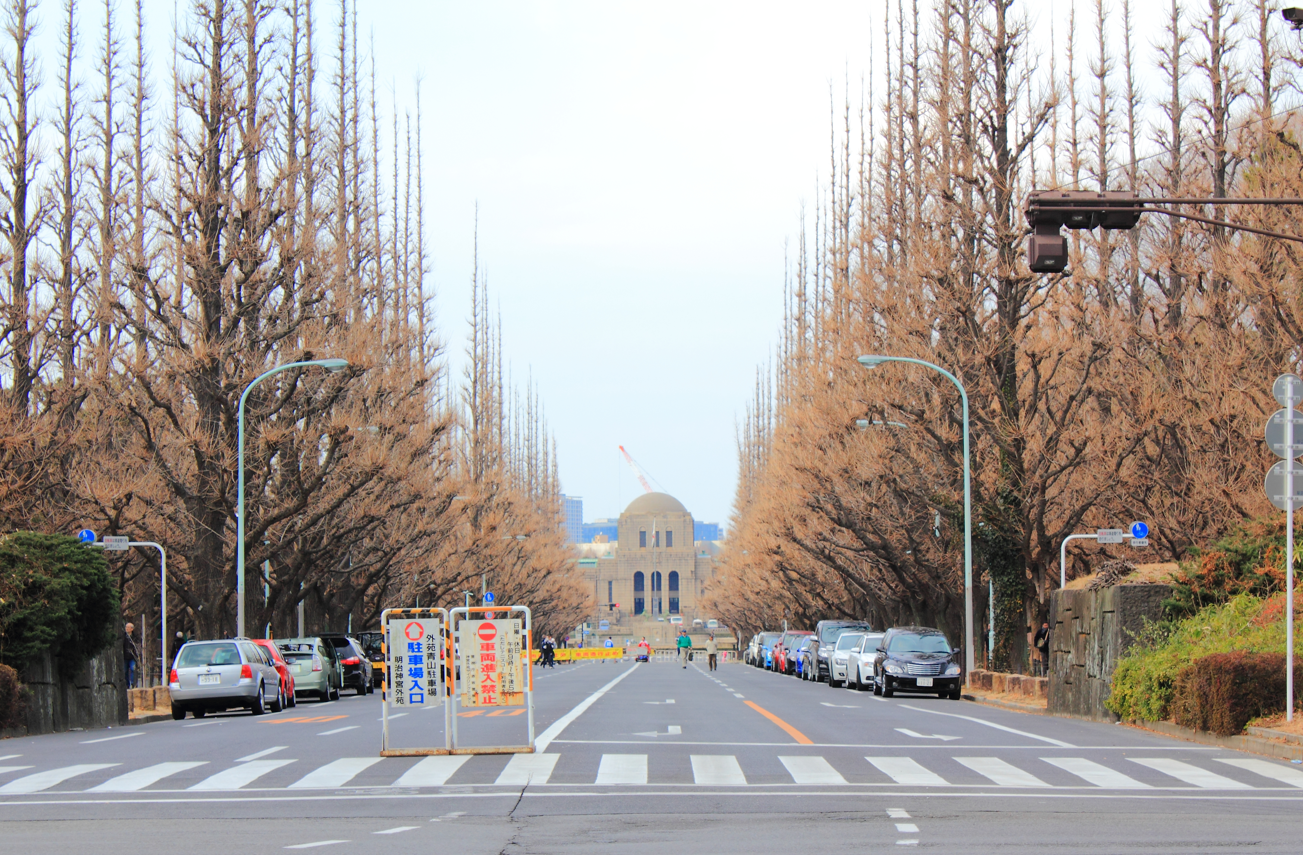 神宮外苑銀杏並木(東京都港区)